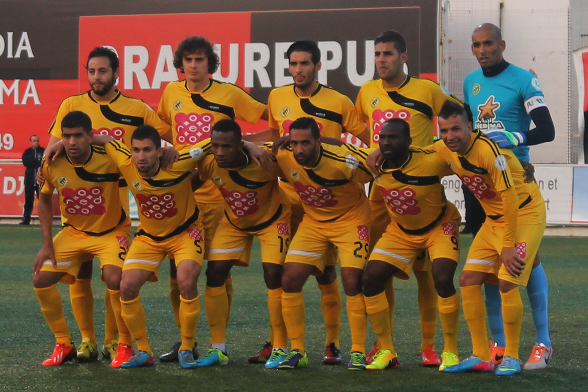 Photo d'équipe de l'USM El Harrach avant un match de Ligue 1 contre l'USM Alger au stade Omar-Hamadi le 15 février 2014. Debout de gauche à droite : Ziane-Cherif, Hendou, Aït-Ouamar, Mazari, Doukha. Accroupis de gauche à droite : Boulakhoua, Younes, Amada, Belkhir, Sylla, Boumechra.